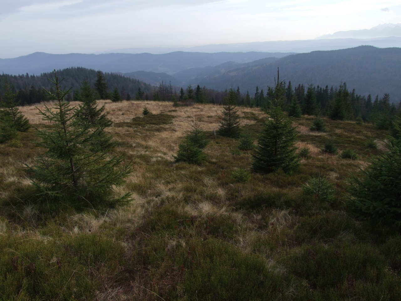 Widok z polany Przysłop na Magurki i Tatry